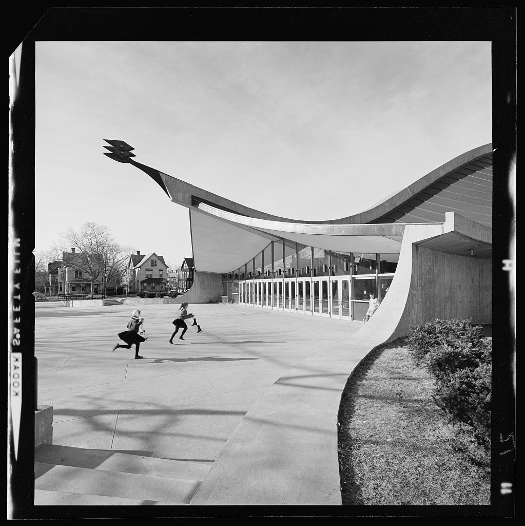 Yale University, David S. Ingalls Hockey Rink, New Haven, Connecticut, 1956-59. Exterior Note: No known restrictions on publication. Balthazar Korab Archive (Library of Congress).